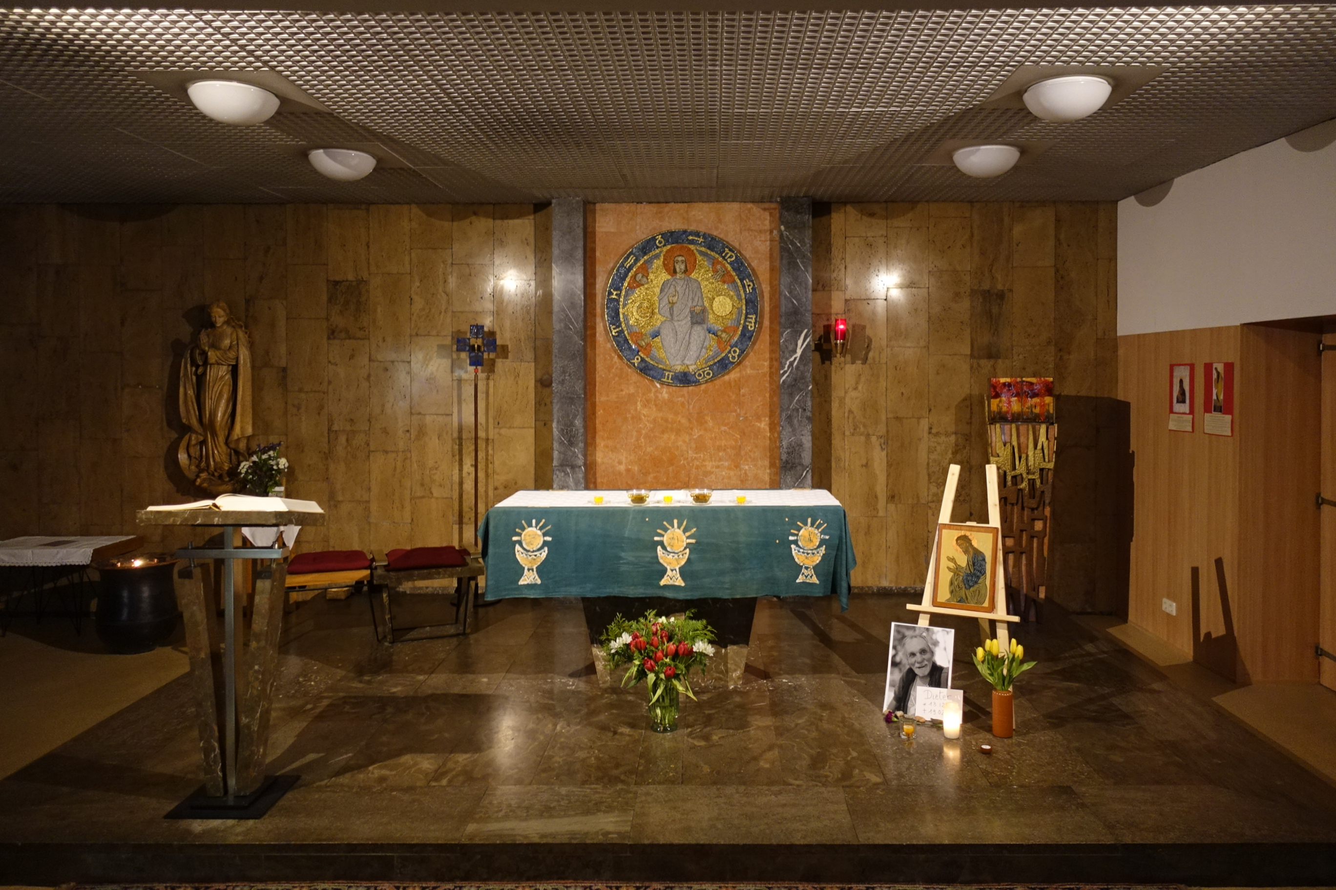 Der Kirchsaal mit Altar und Ambo